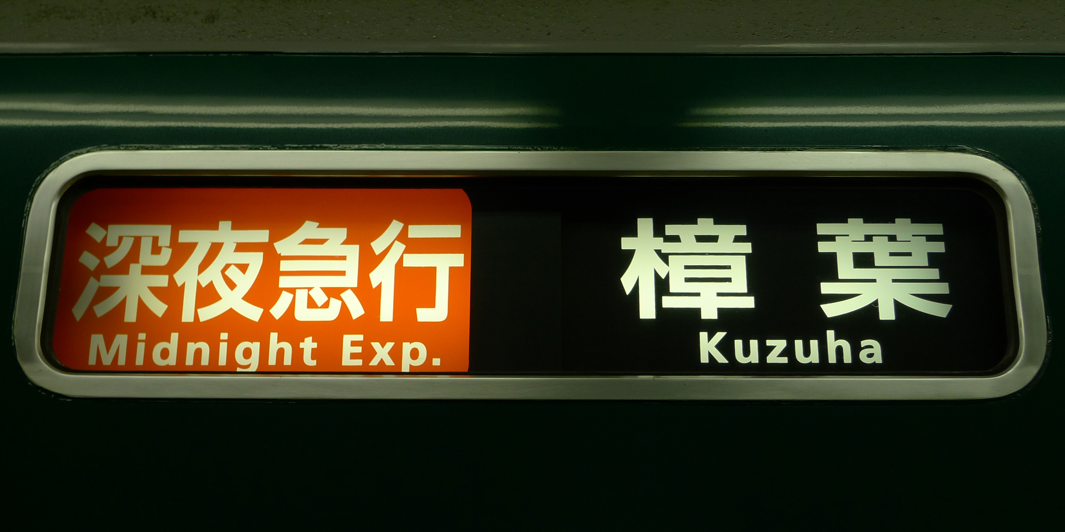 樟葉行き深夜急行の幕